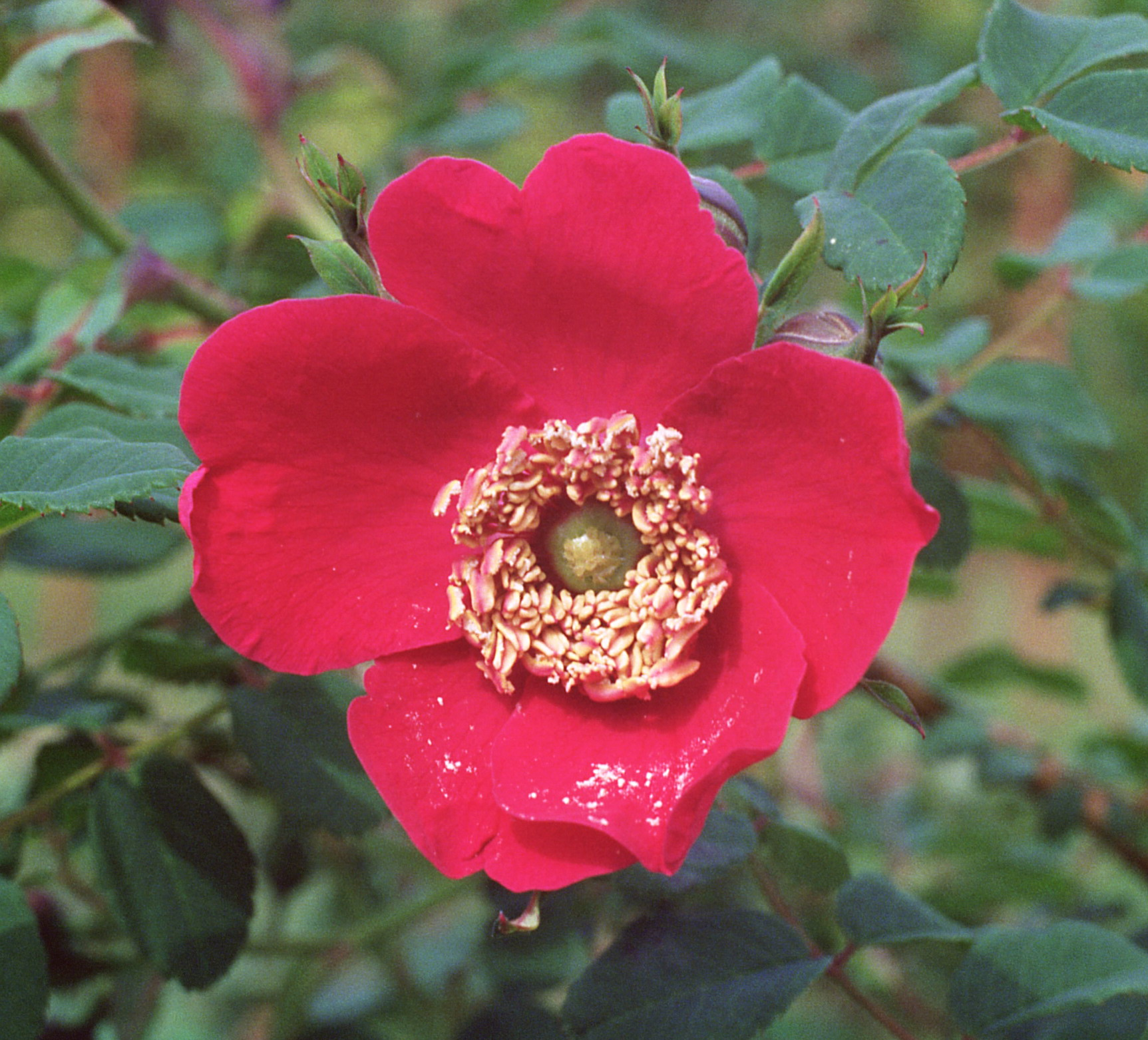 Rosa moyesii, sect. Cassiorhodon. Real Jardín Botánico, Madrid